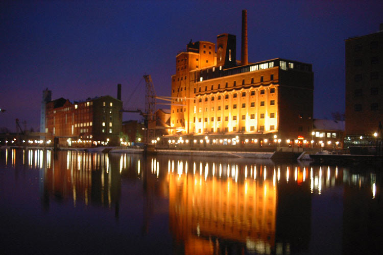 Innenhafen Duisburg - Speicherzeile mit Küppersmühle und Werhahnmühle